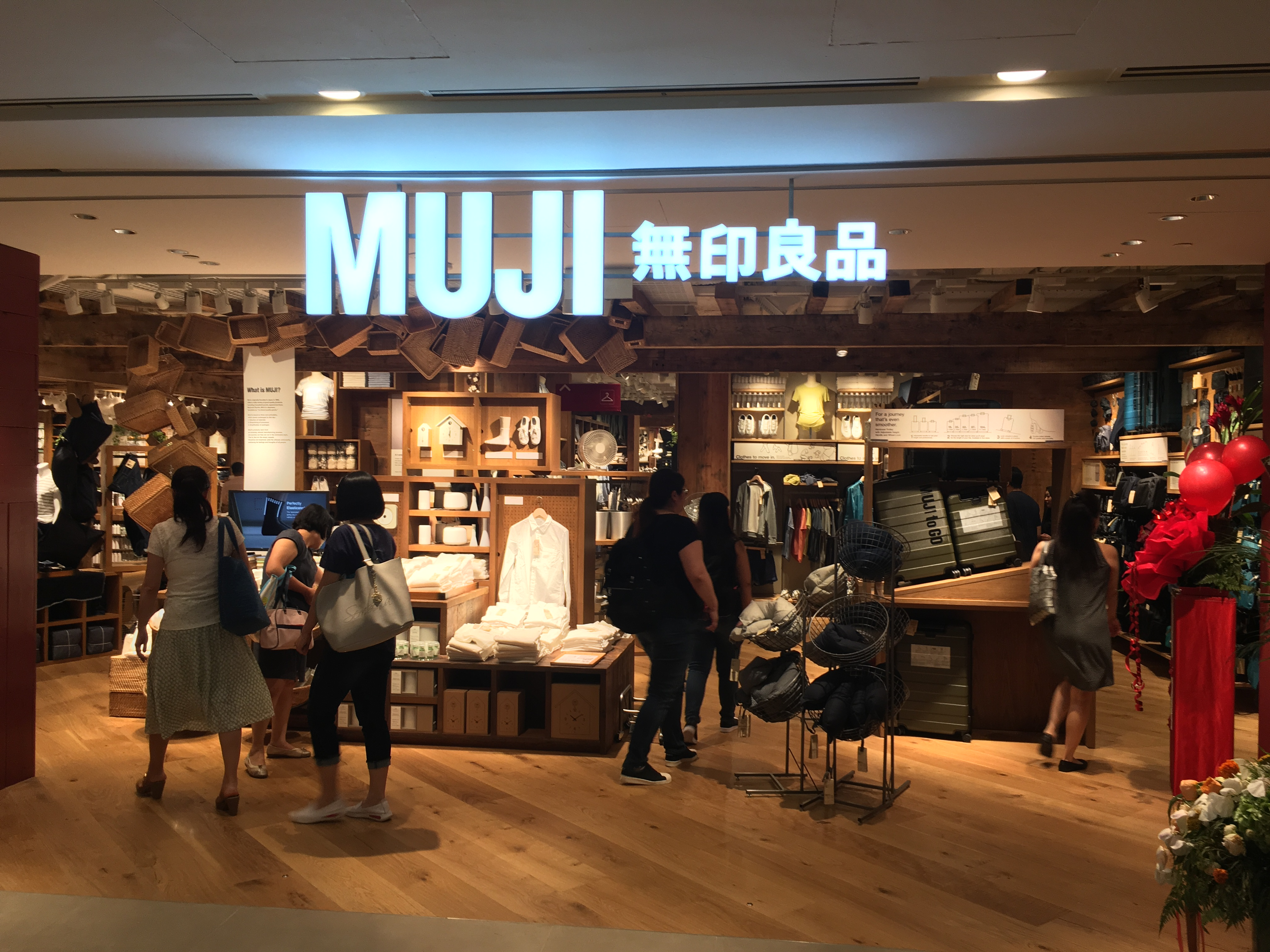 Muji Store in Plaza Singapura, Singapore.